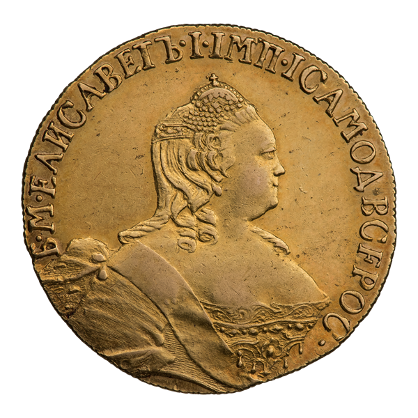 Пять рублей 1755 г. (аверс). ГМ 226.XII.10; Биткин 82 (R2). Профильный портрет императрицы, вправо; в императорской горностаевой мантии, расшитой двуглавыми орлами; на голове императорская корона, в причёску вплетены украшения. Бюст в расшитом и украшенном драгоценными камнями платье с подвесками. Через правое плечо надета Андреевская лента. Без обозначения монетного двора. Круговая надпись: Б∙М∙ЕЛИСАВЕТЪ∙I∙IМП∙IСАМОД∙ВСЕРОС∙